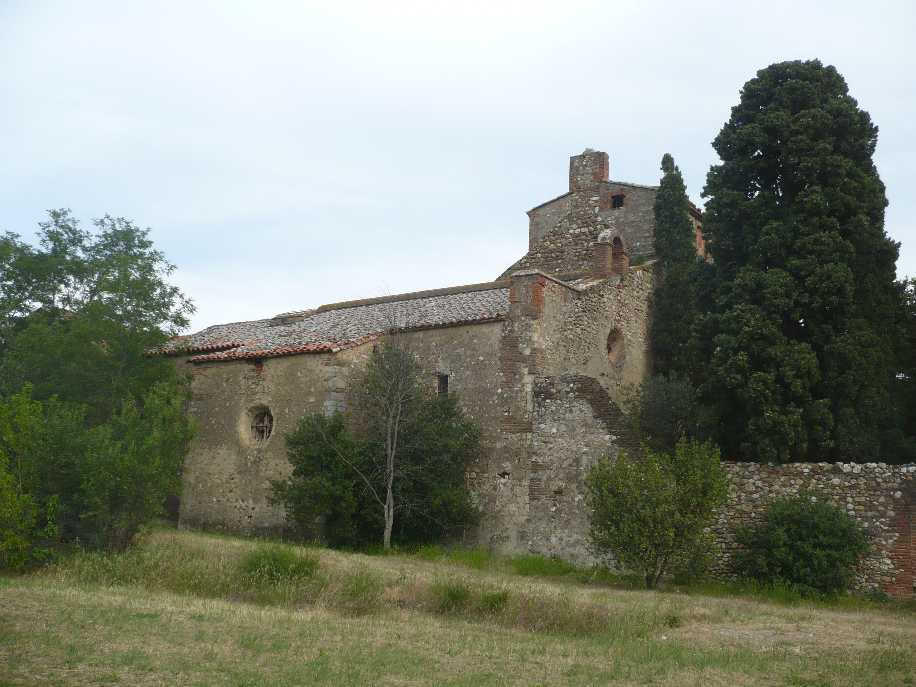 Façade arrière du Monastir del Camp .